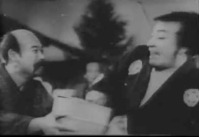 『血煙高田の馬場』、スチル写真、1937年